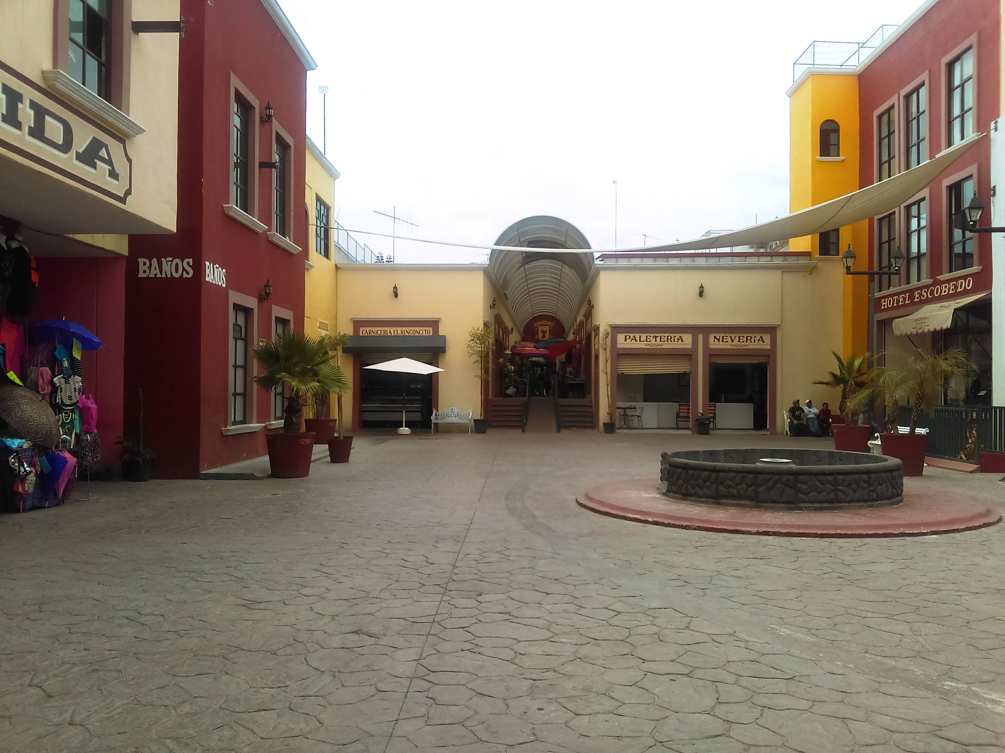 Mercado 8 de julio en Actopan, Hidalgo, México